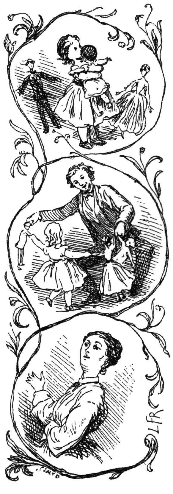 Illustration to Dandse, Dandse Dukke Min